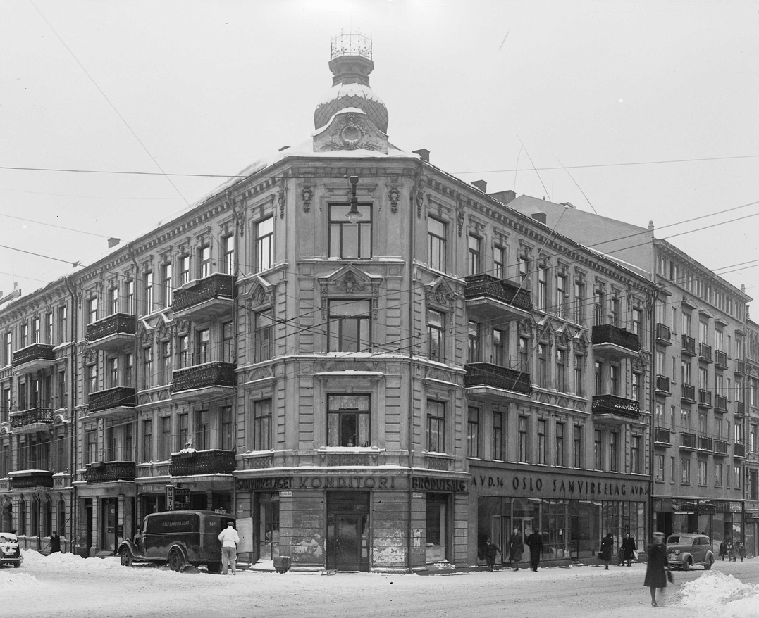 Bogstadveien 62 (ark. Rudolf Haeselich, 1896), med avd. 34 av Oslo samvirkelag. Foto: Leif Ørnelund, 14. august 1948. Fra Byhistorisk samling hos Oslo Museum.